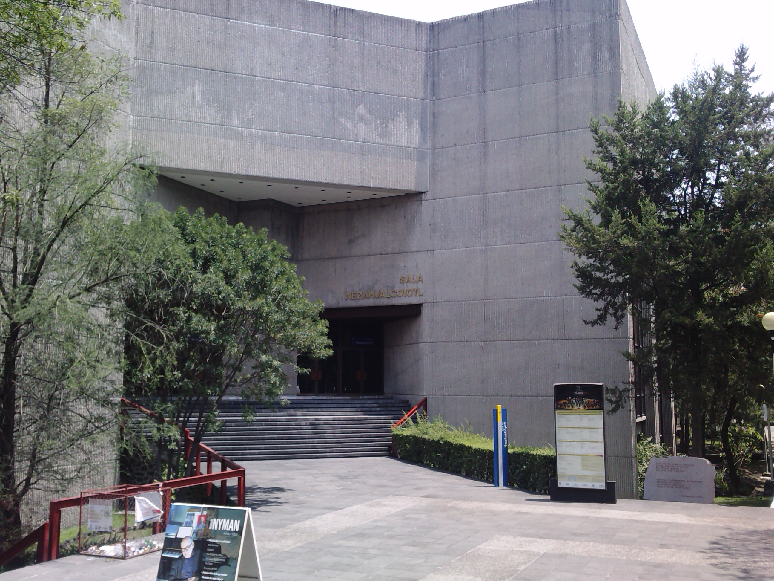 sala nezahualcoyotl